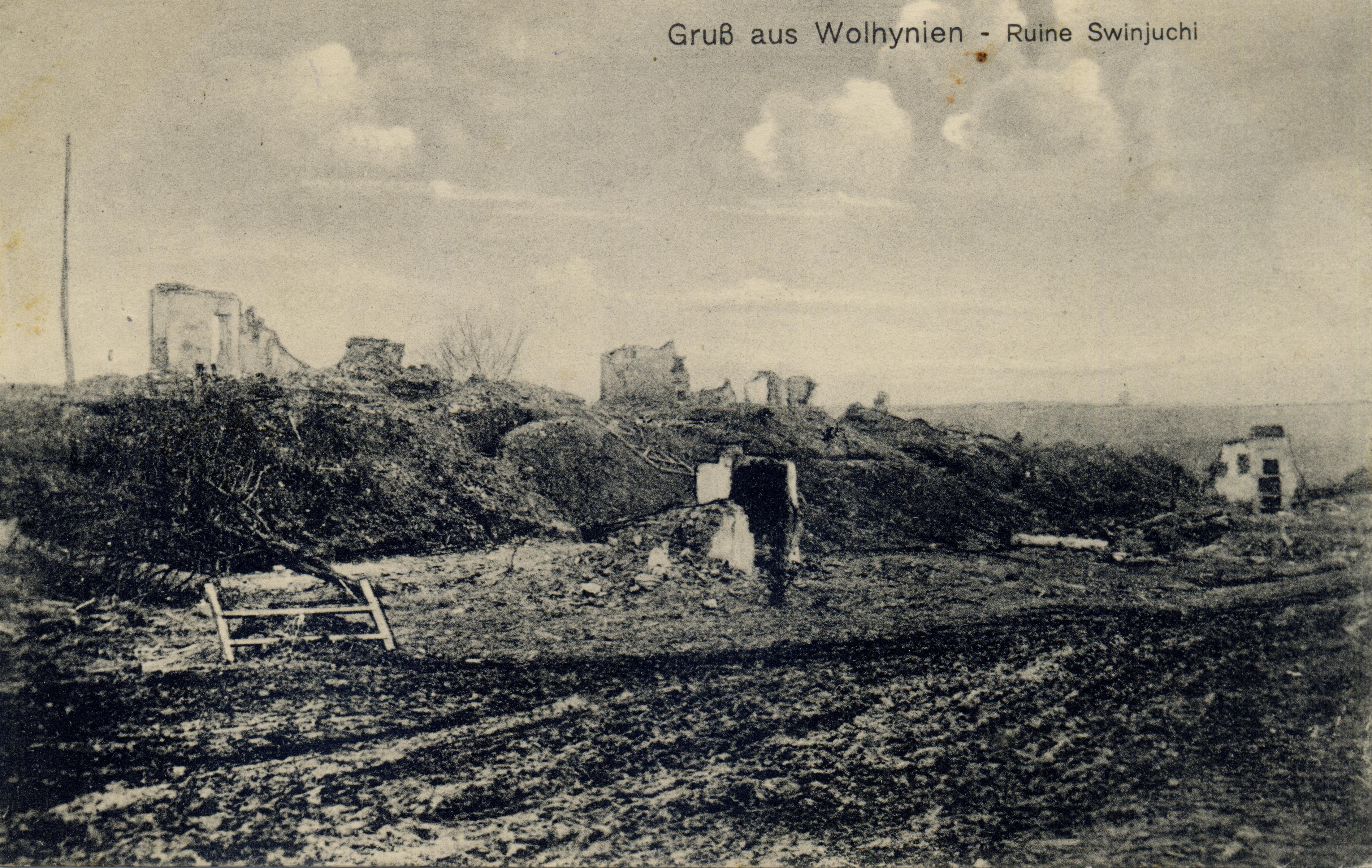 Поштова листівка "Вітання з Волині. Руїни Свинюх"